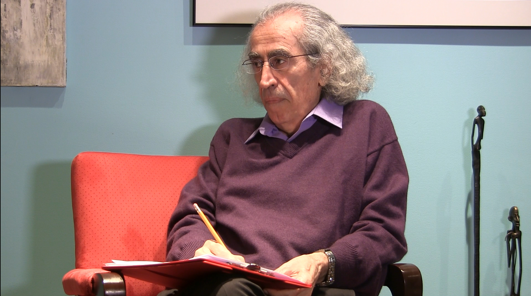 امیر حسن‌پور هنگام مصاحبه تلویزیونی در منزل شخصی‌اش در تورنتو